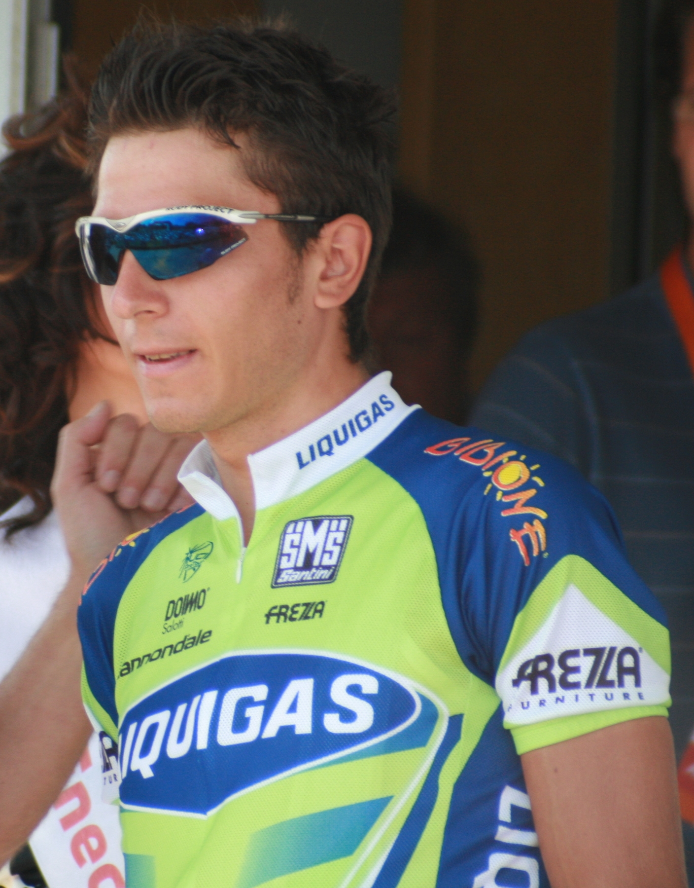 Enrico Franzoi, au départ de la cinquième étape de l'Eneco Tour 2008, à Ardooie